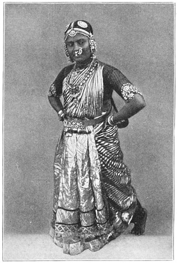 Pondichéry